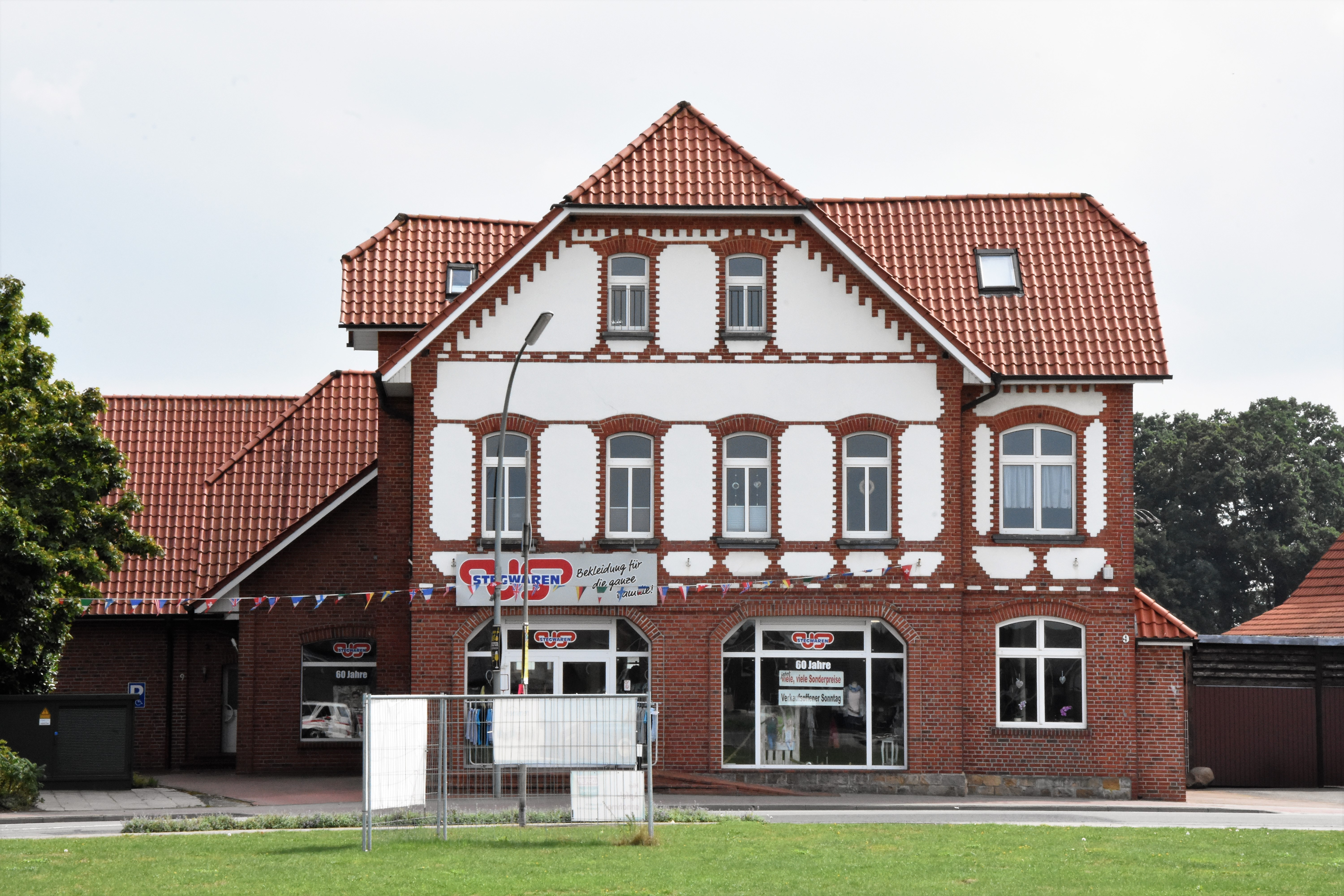 Ehemaliger Bahnhof Bawinkel an der LBQ-Kleinbahn